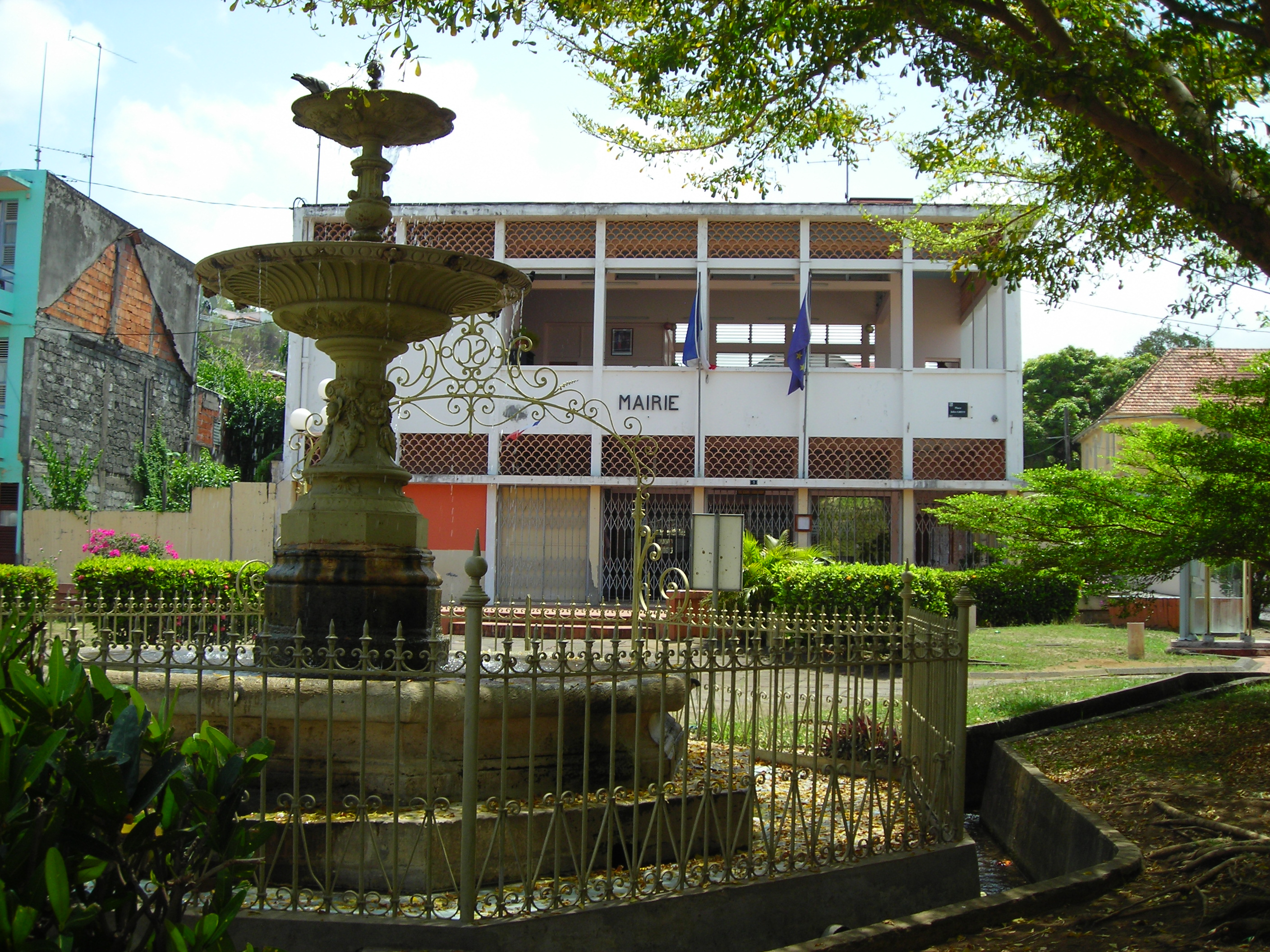 Mairie de la commune du Carbet (Le Carbet) en Martinique